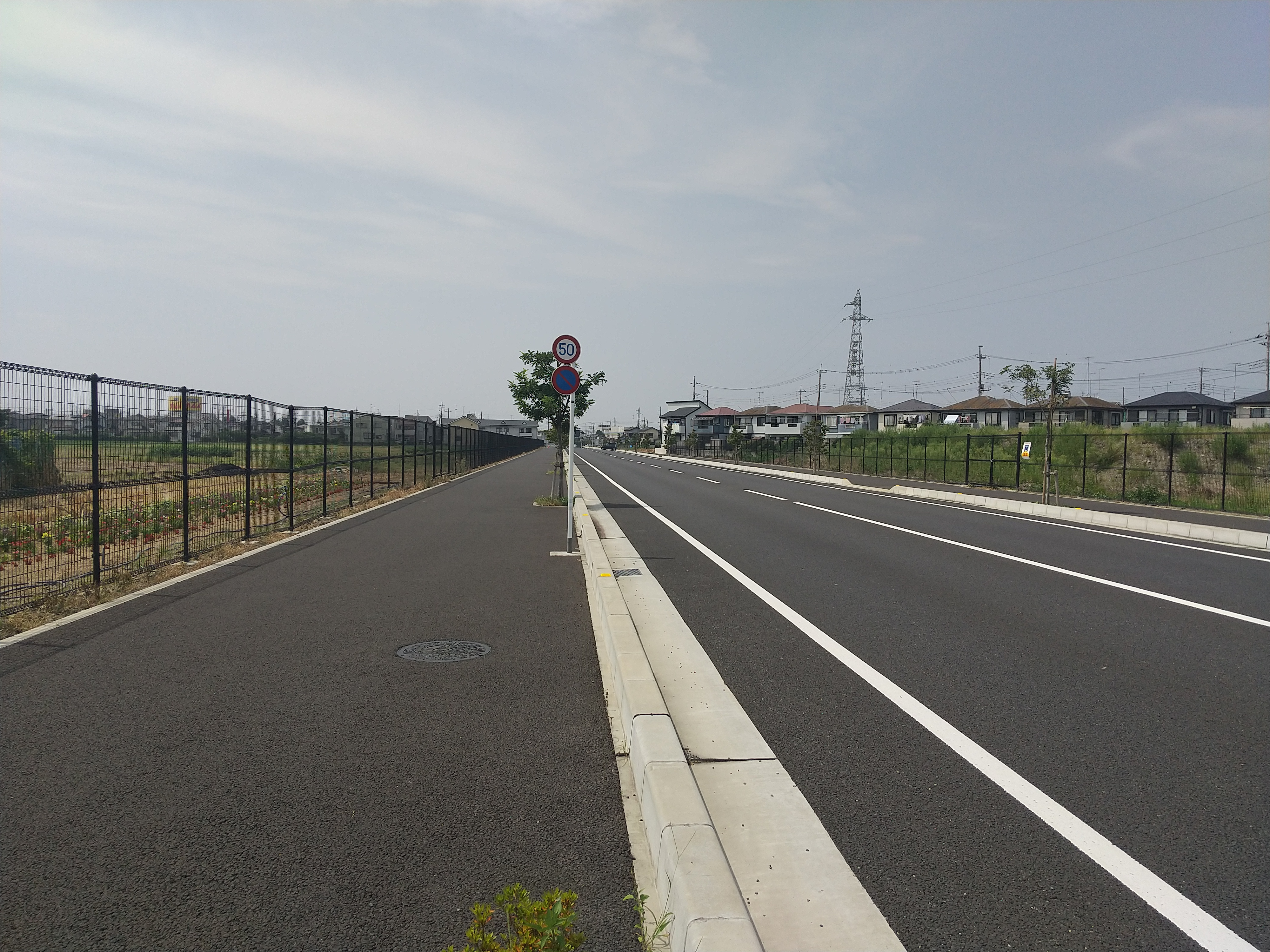 熊谷市大原付近にて